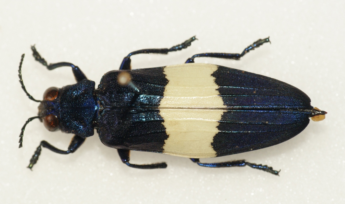 Buprestidae - In collection